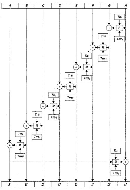 Расширения ключа